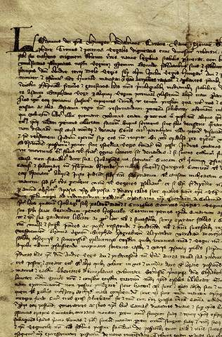 Aranybulla 1351-es átírása